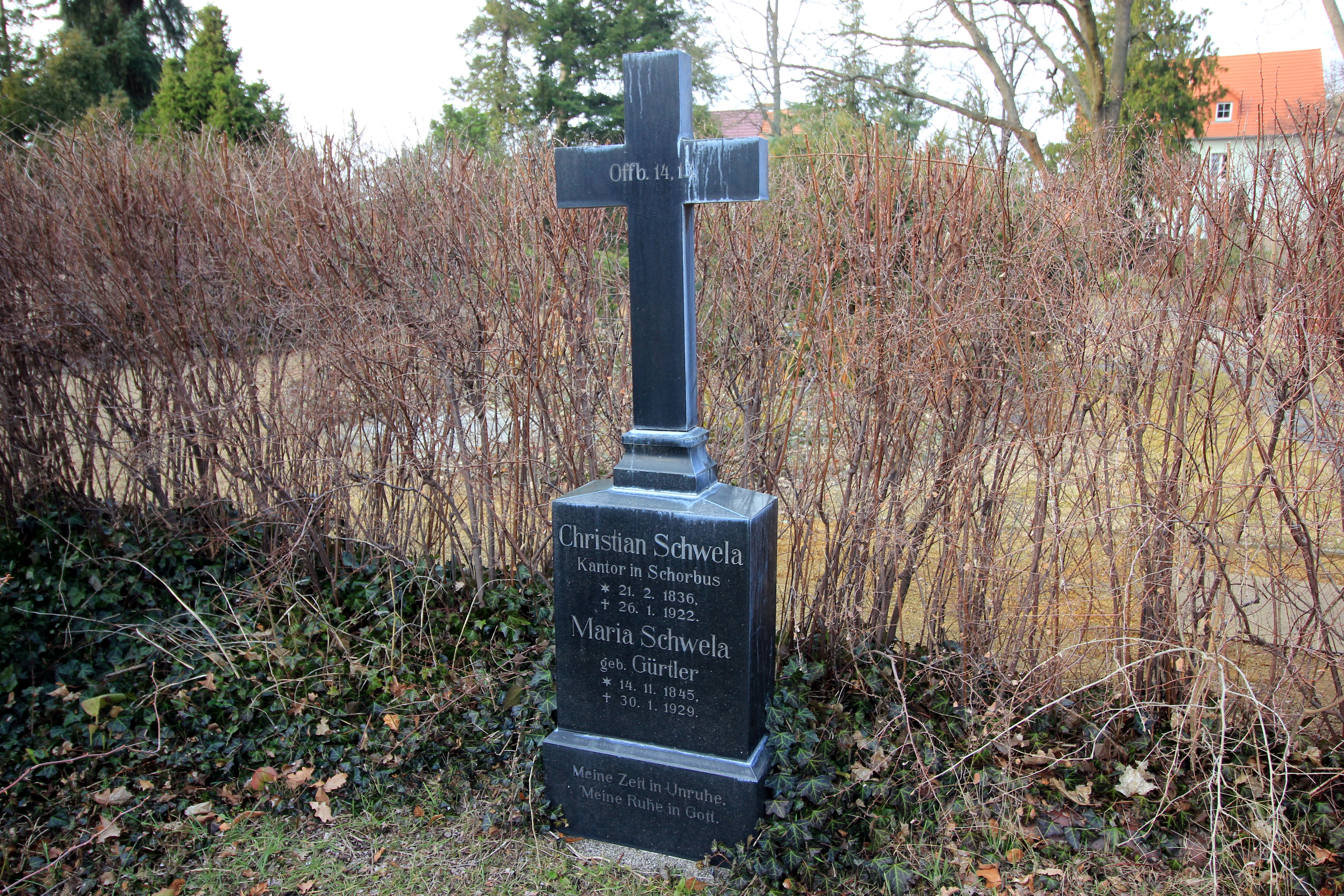 Hornjoserbsce: Row Kita Šwjele na Sewjernym kěrchowje w Choćebuzu. Dolnoserbski: Row Kita Šwjele na Pódpołnocnem kjarchobje w Chóśebuzu.